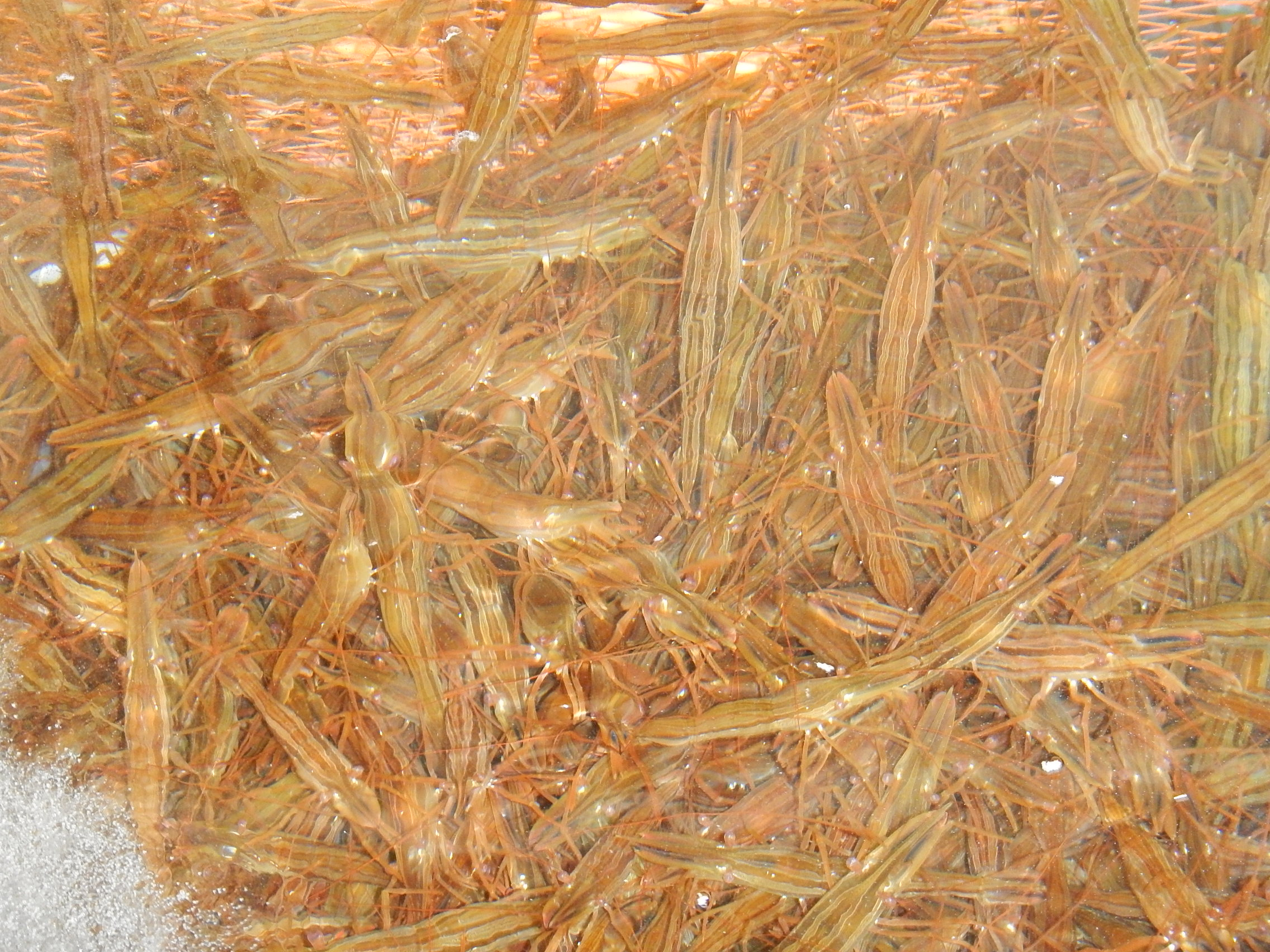 ホッカイシマエビ 野付湾産